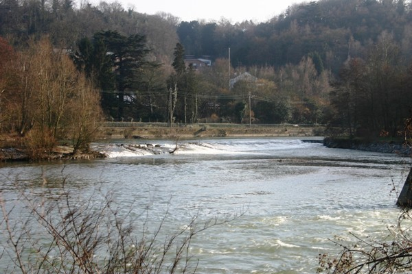 Den Deich vun der Schleis fir d'Héeicht vum Wassernivo ze garantéeiren.